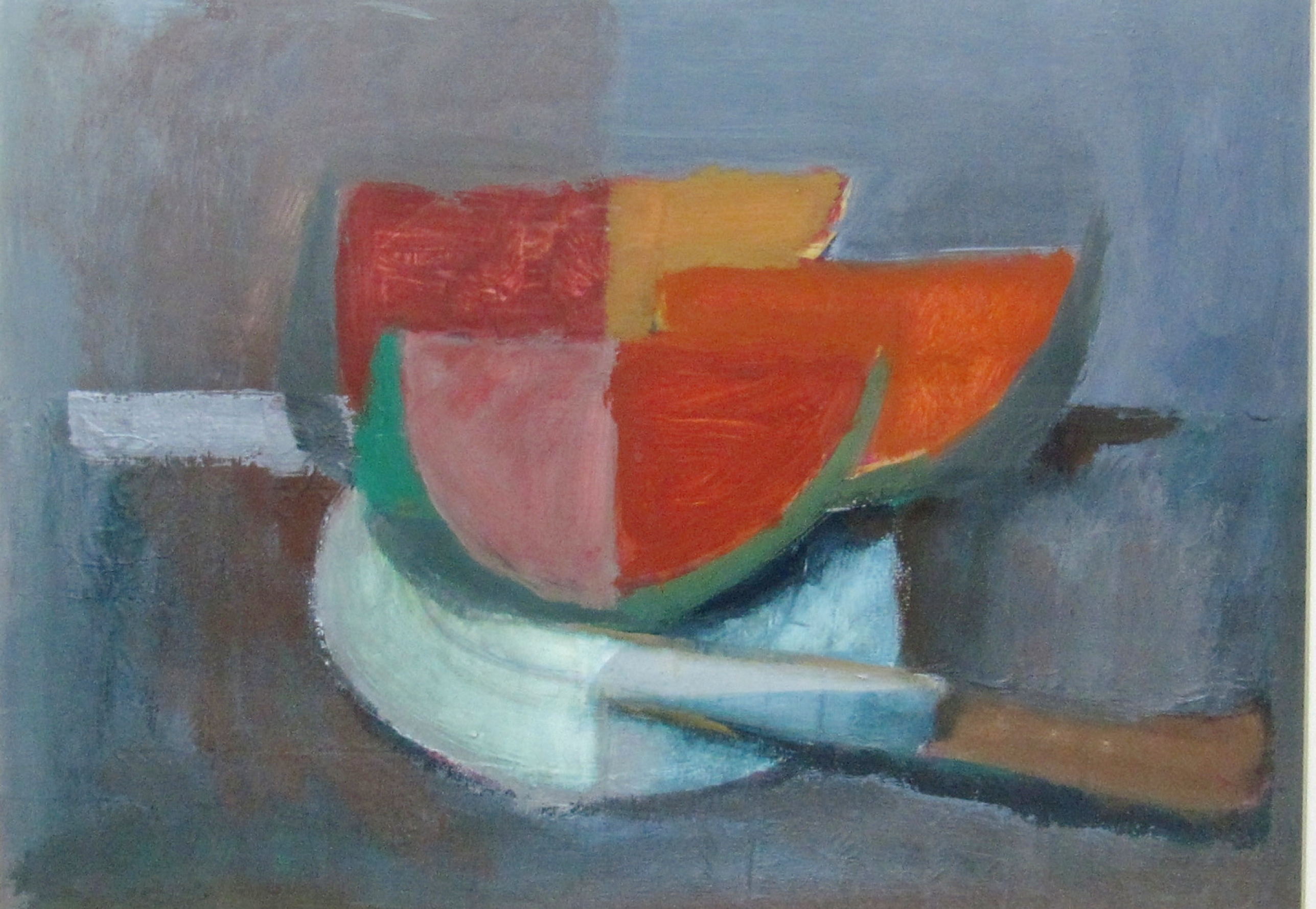 Stillleben, Melone, 60er Jahre, Gemälde, Hannover